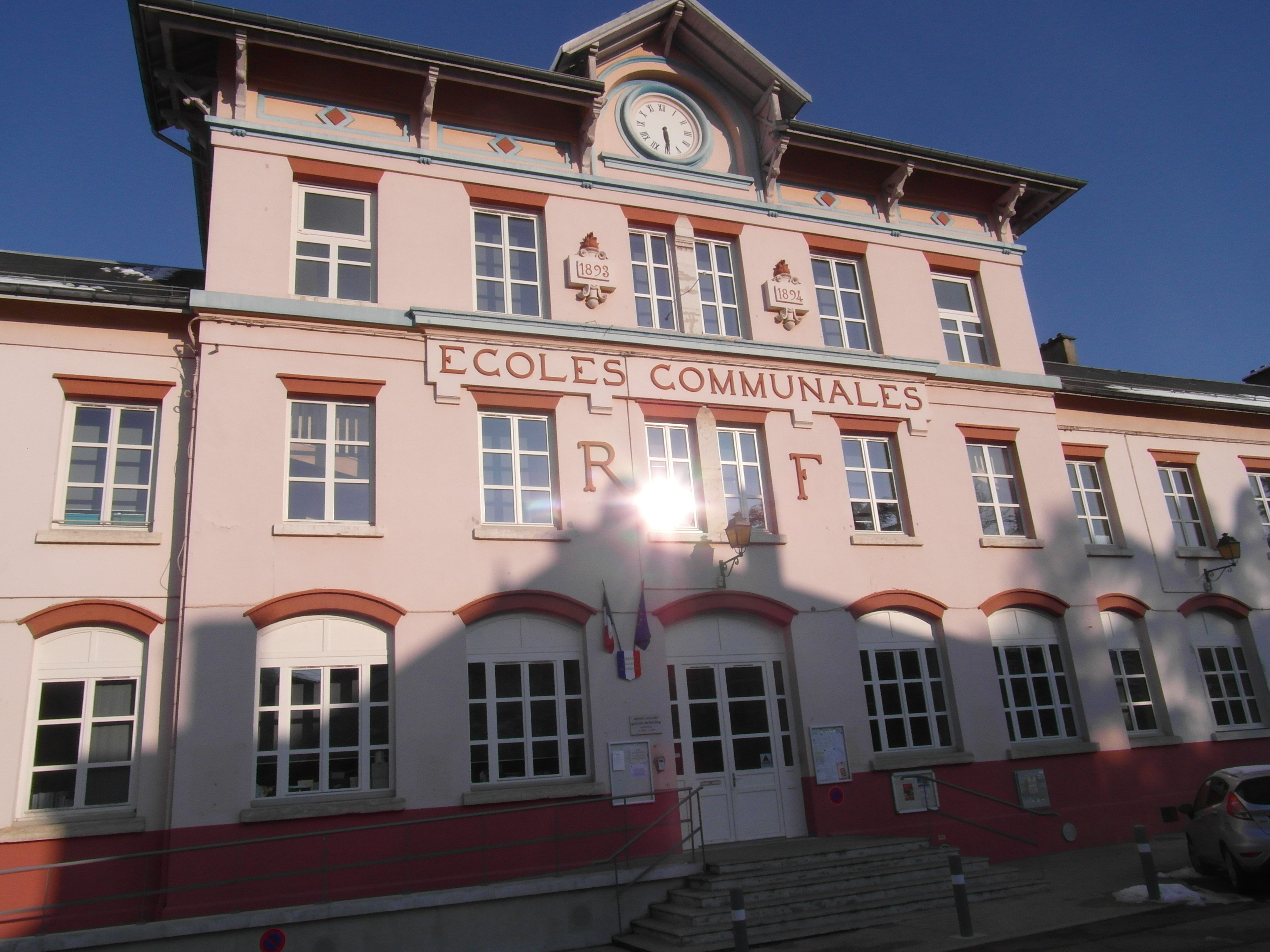 école municipale de Pont de Beauvoisin (isère)